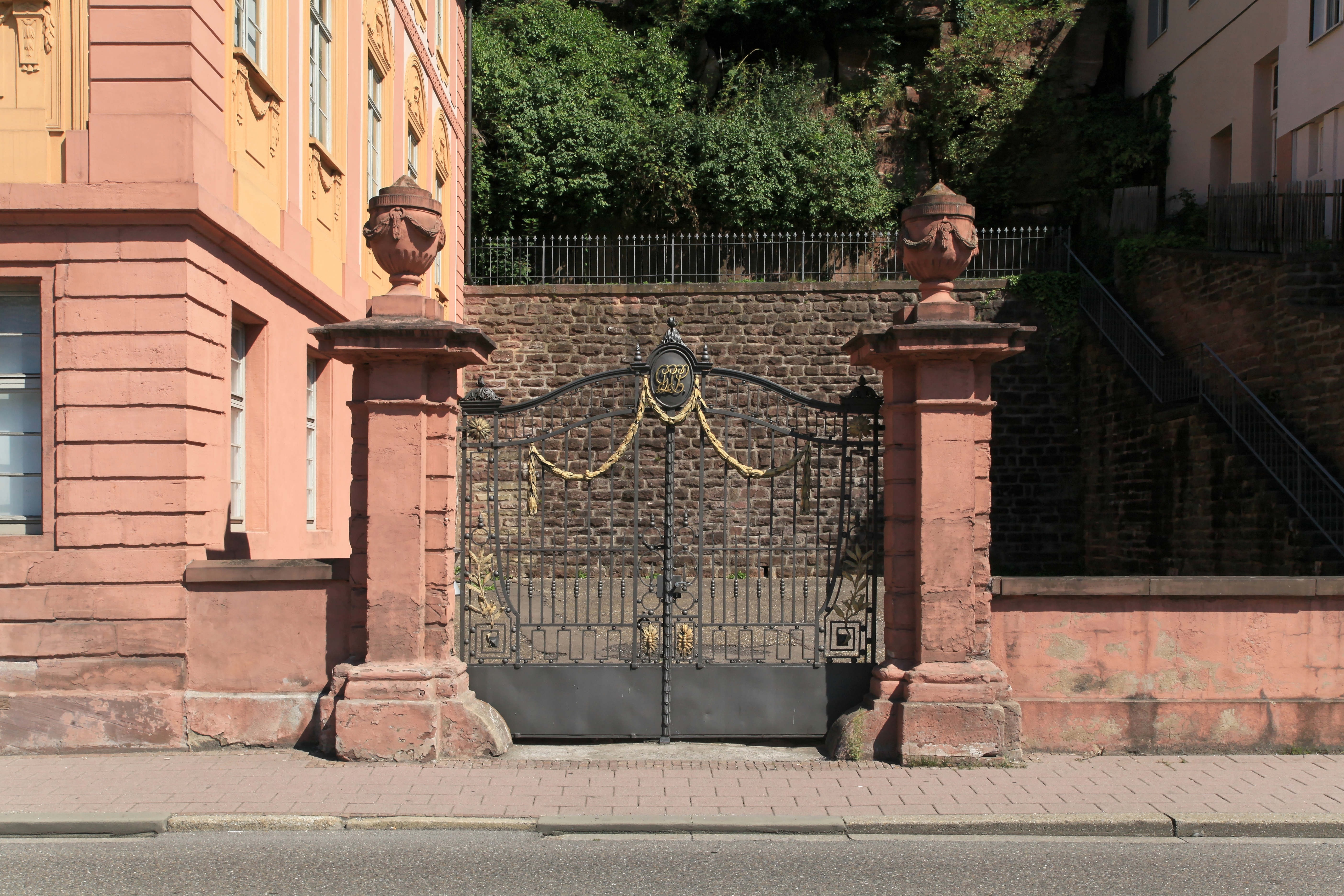 Palais Vischer, Bischofstraße 48 in Calw